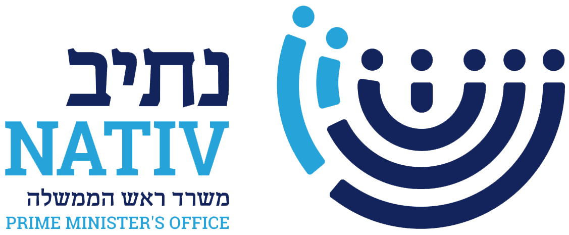 הסמל של חדש של נתיב (מאז 2018)